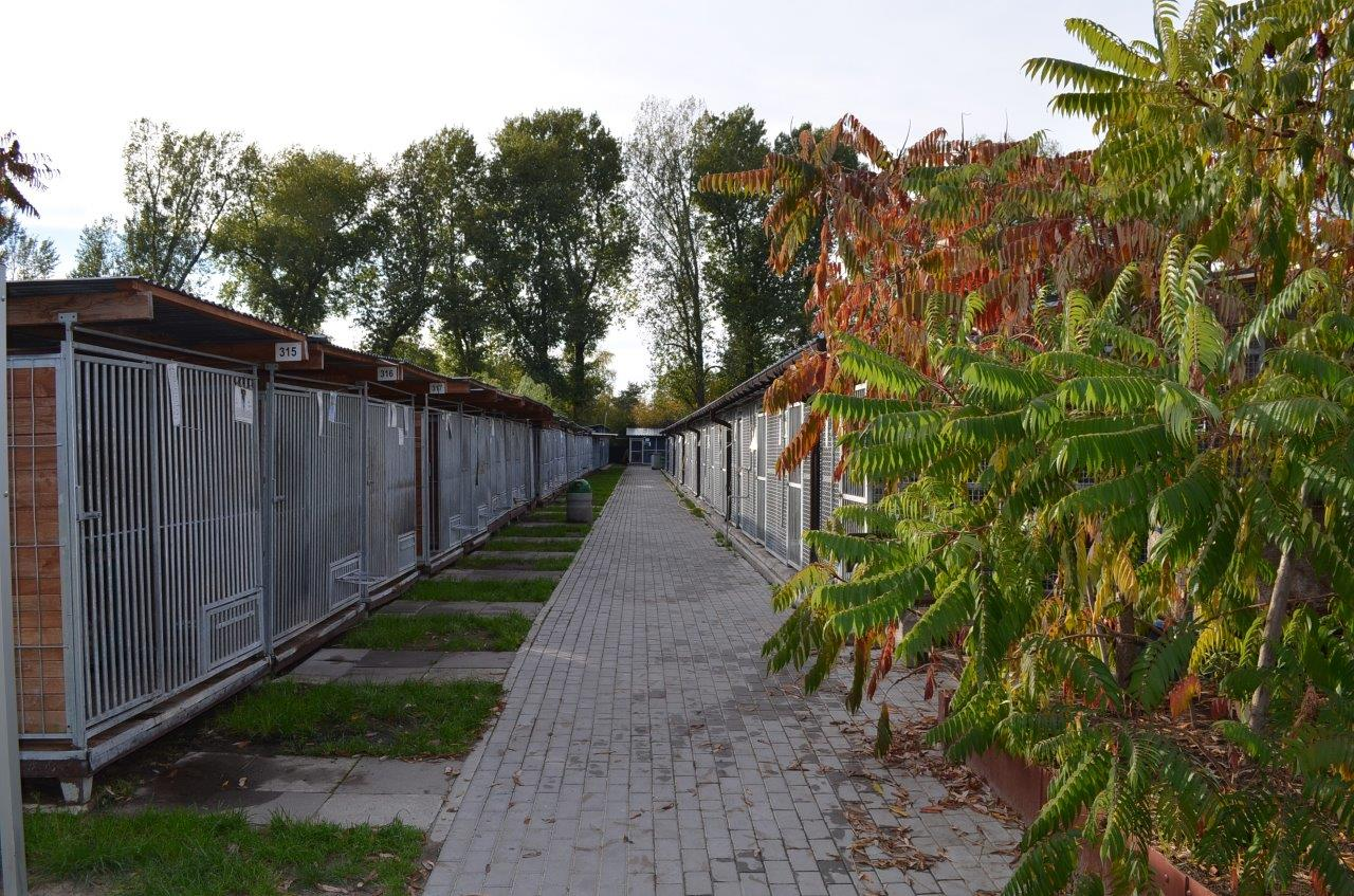 boksy